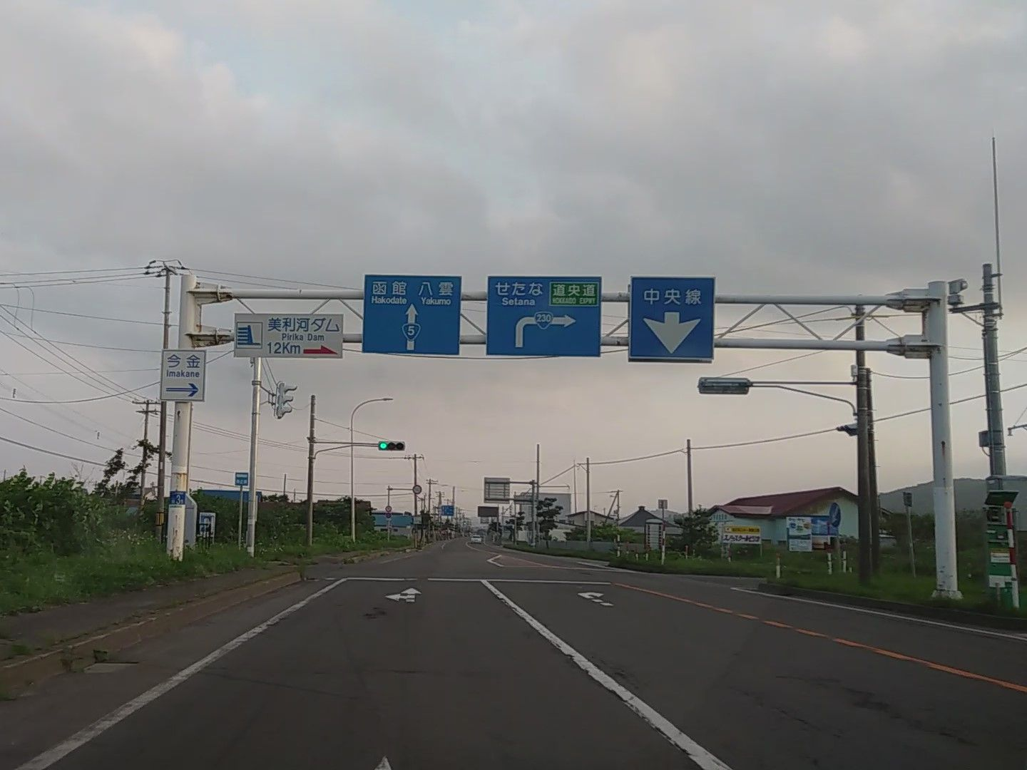 国道230号・国道5号交点（重複終了点）長万部町国縫（2018年7月撮影）